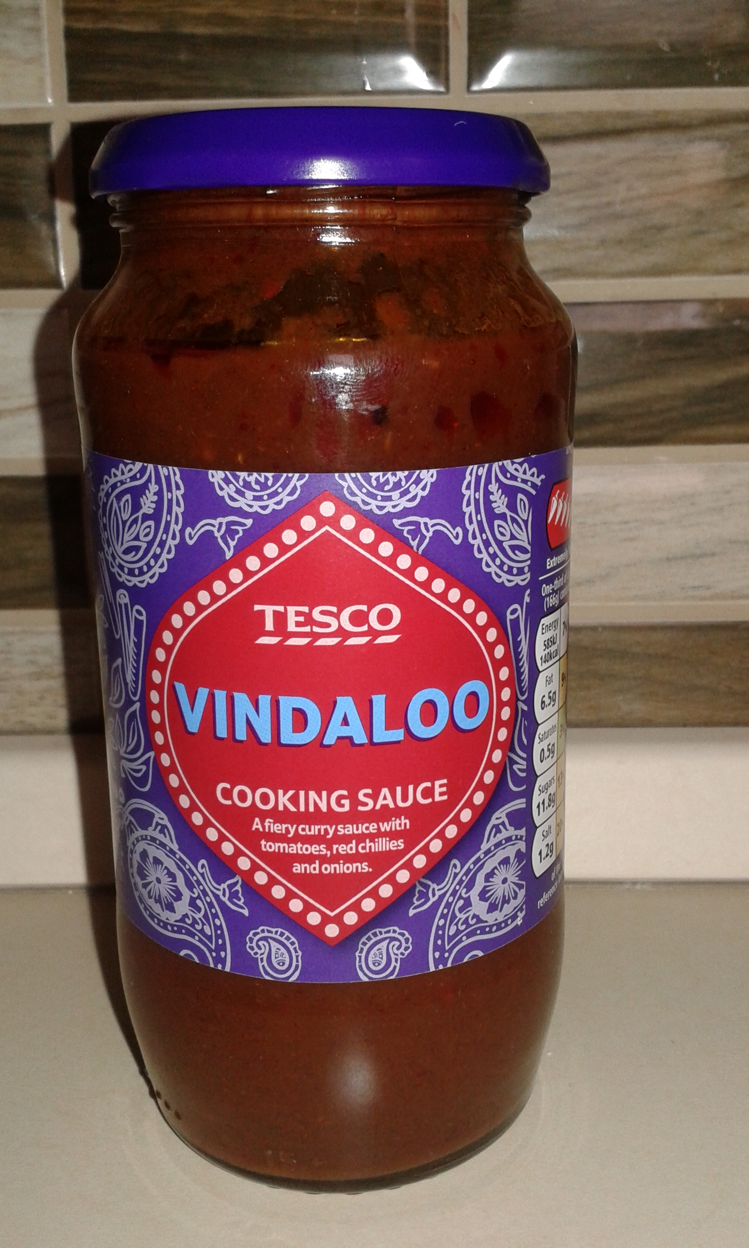 Vindaloo